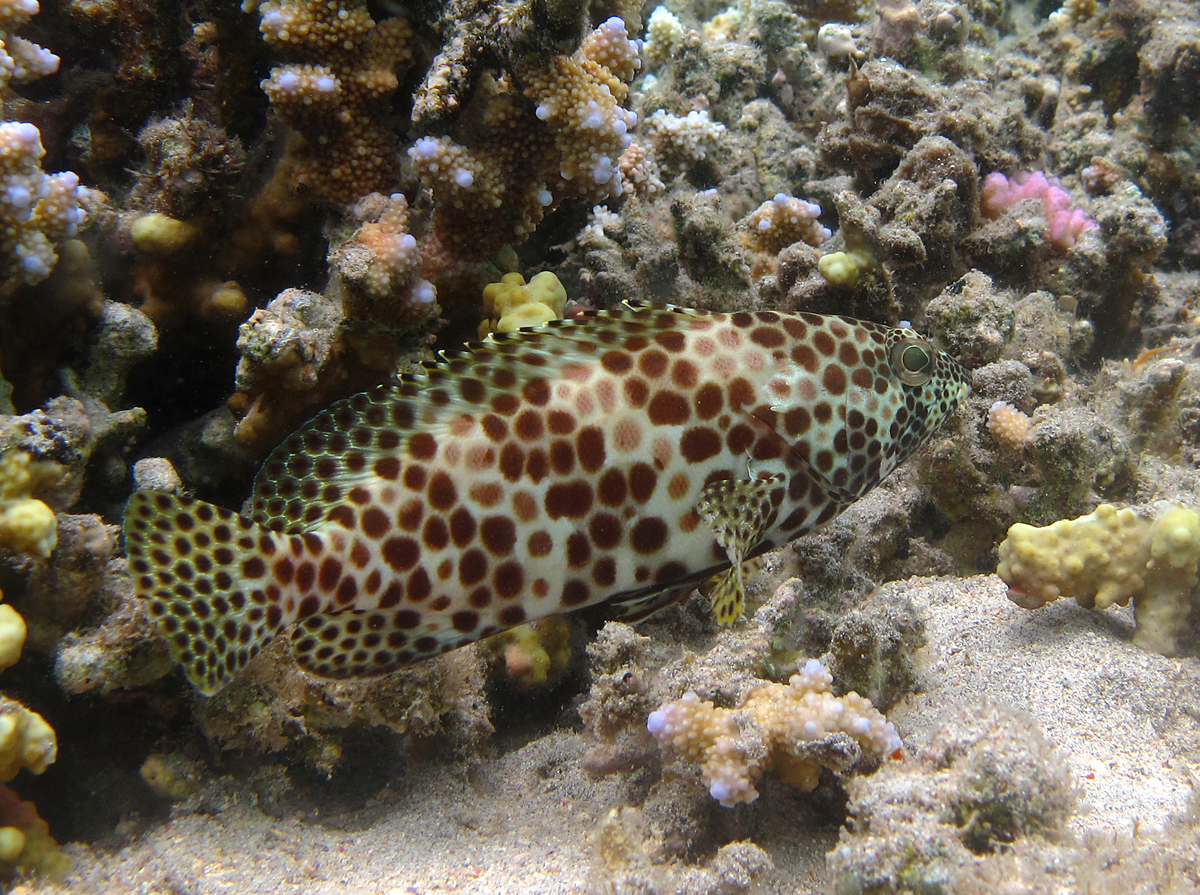 Un mérou gâteau de cire (Epinephelus merra) à la Réunion.